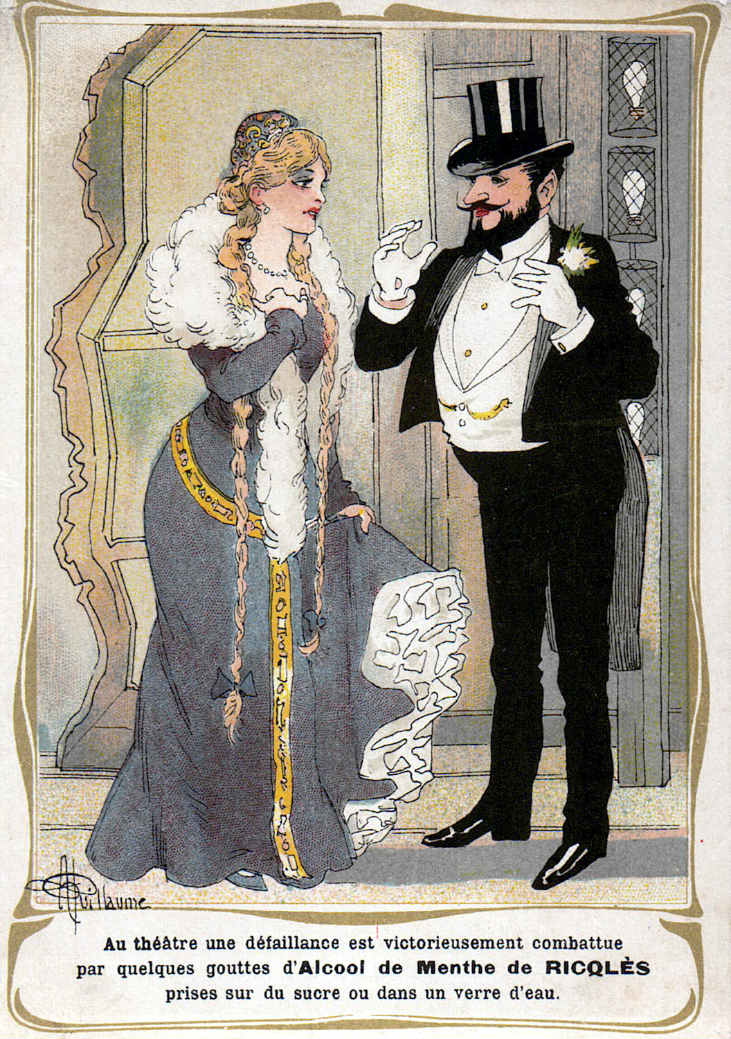 Au théâtre une détaillance est victorieusement combattue par quelques goutes d'Alcool de Menthe de Ricqlès prises sur du sucre ou dans un verre d'eau.